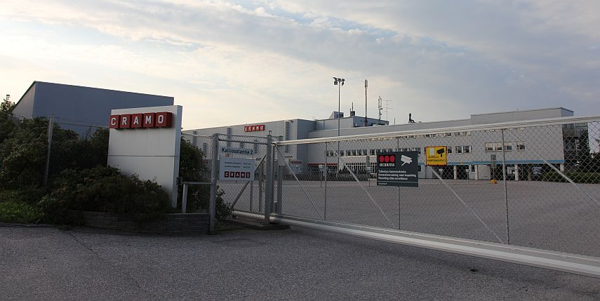 Cramon pääkonttori Vantaalla, osoite: Kalliosolantie 2, 01740 Vantaa. Huom: Muista säilyttää viittaus kuvaajaan, mikäli käytät kuvaa.